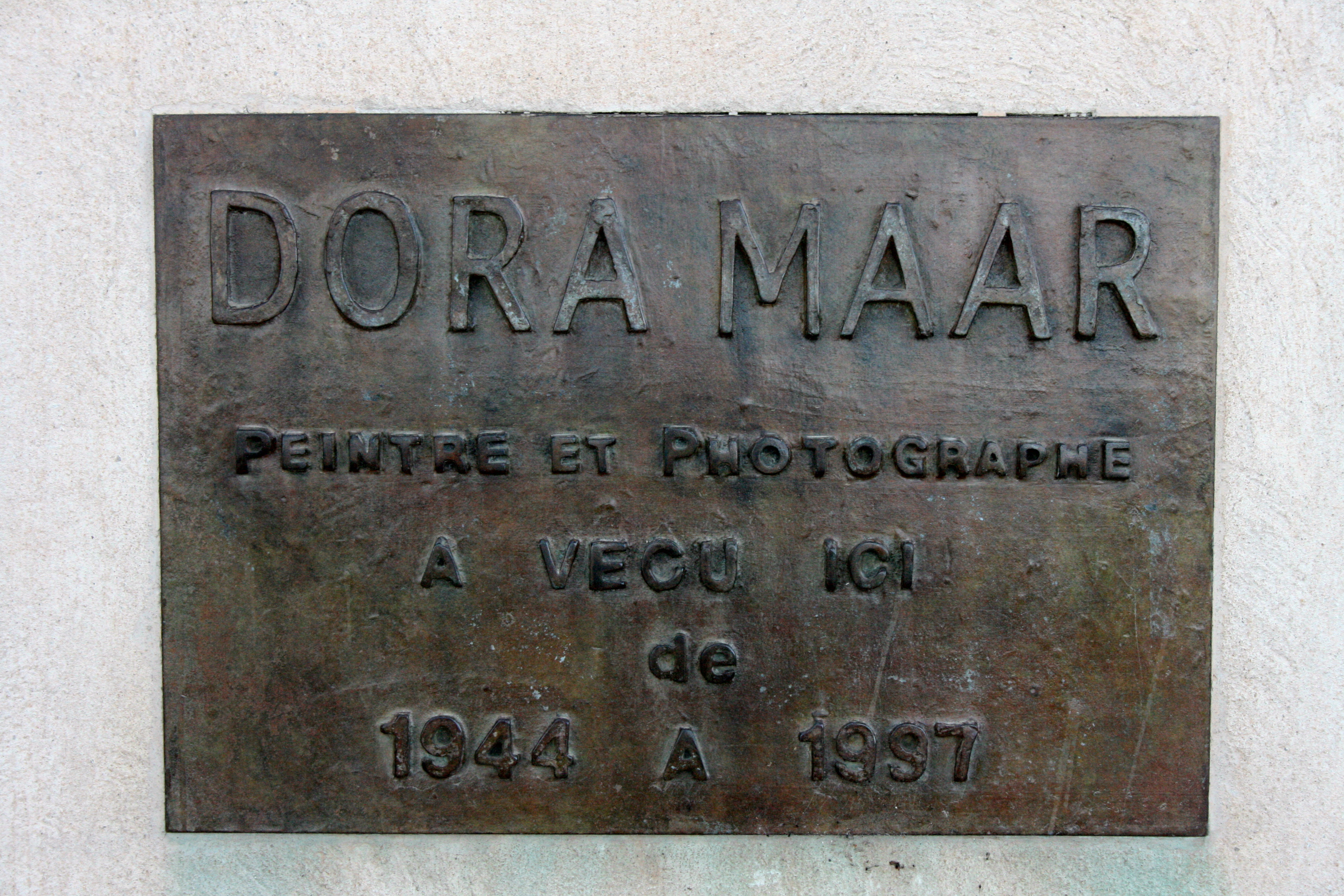 Plaque commémorative : maison de Dora Maar à Ménerbes, département du Vaucluse (France)